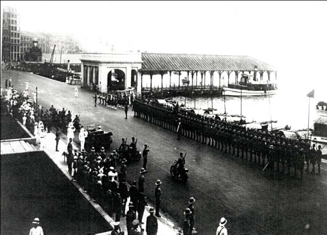 中文（香港）: 1928年香港皇后碼頭閱兵儀式。